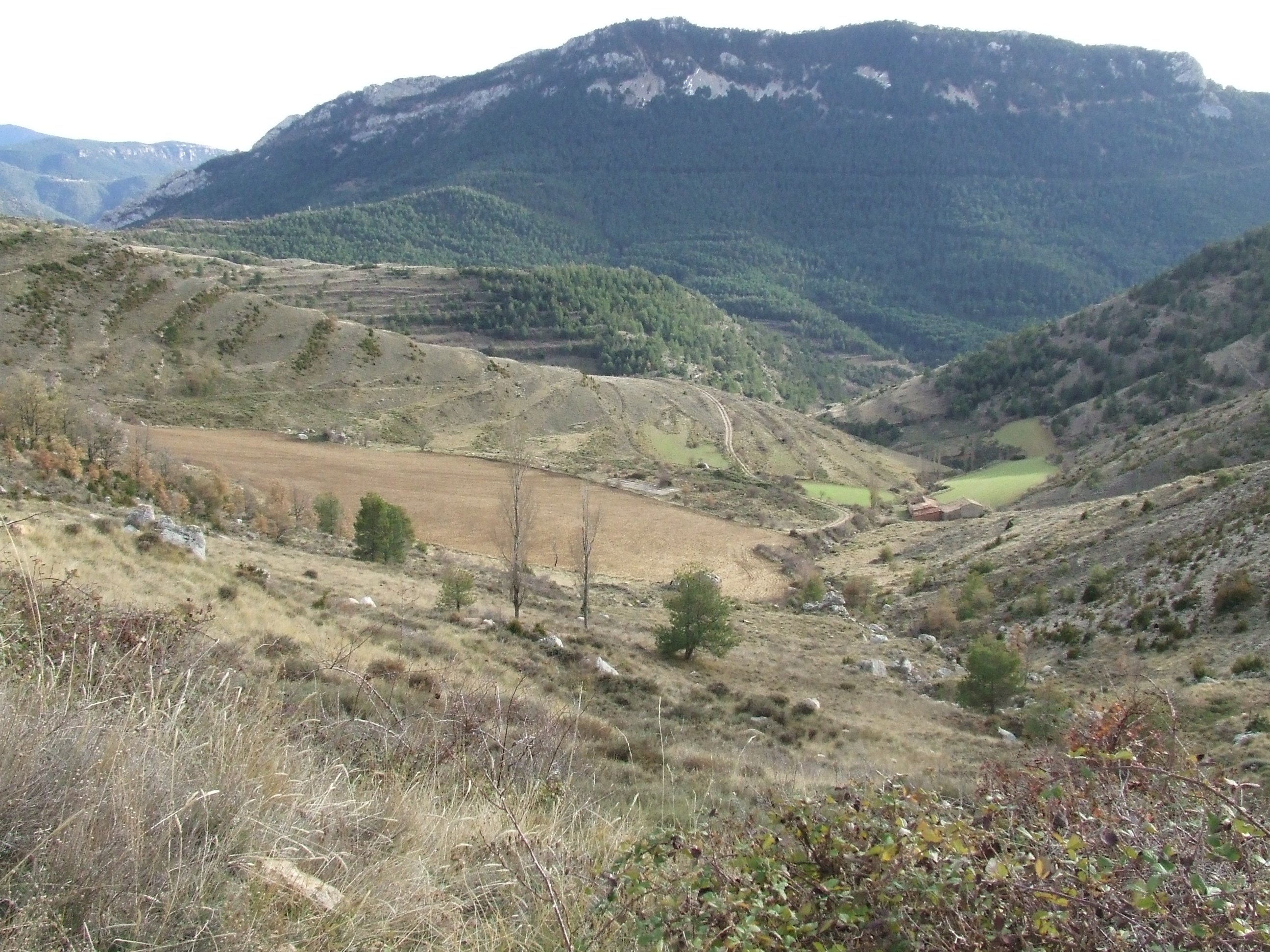 La vall de la Torre d'Eroles (Abella de la Conca, Pallars Jussà)